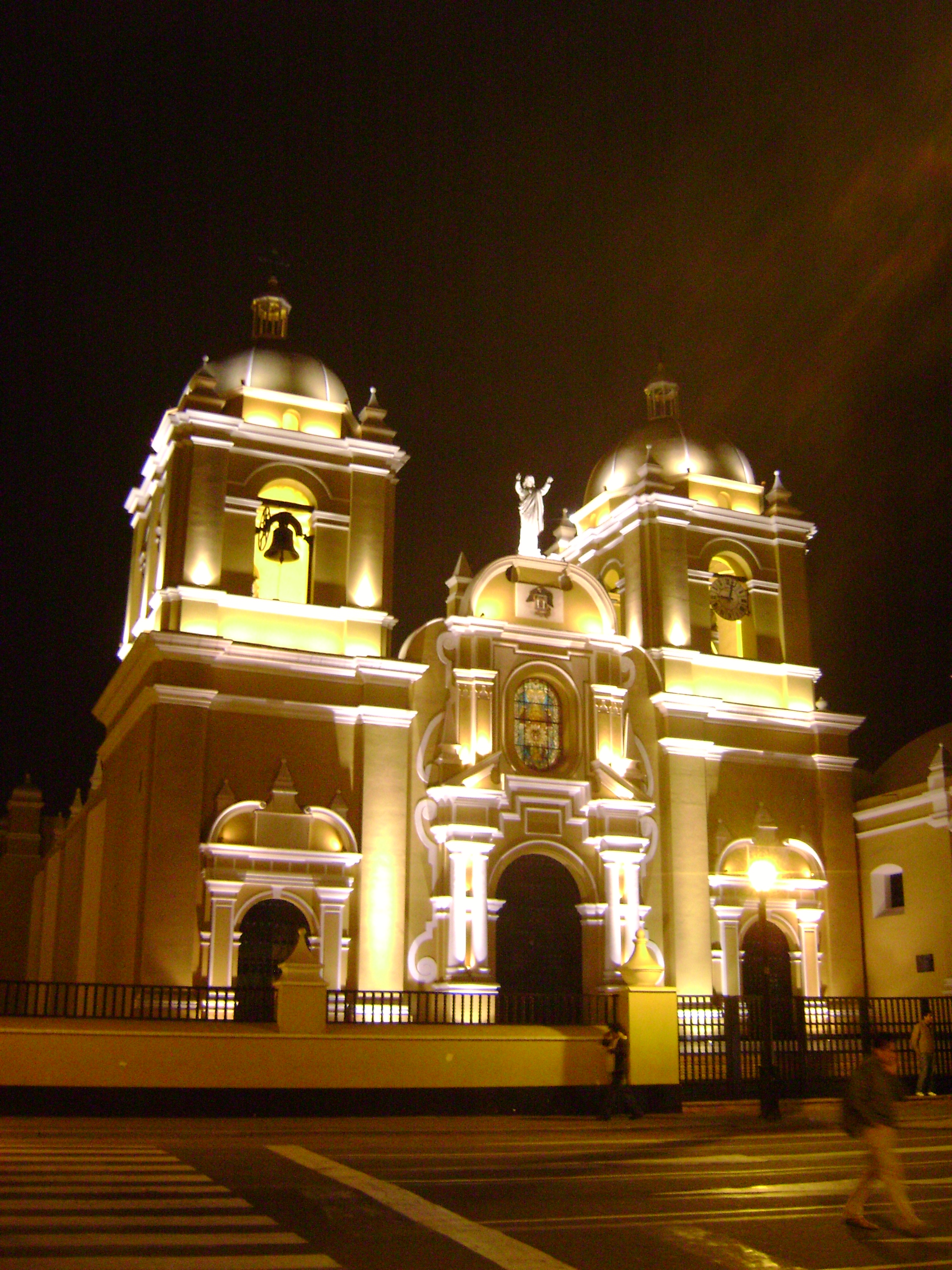 Catedral de Trujillo en la noche. Trujillo (Perú), Perú.